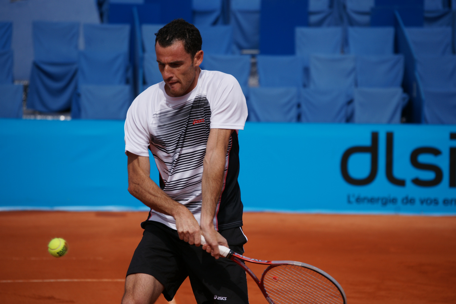 David Guez, Open Nice 2012